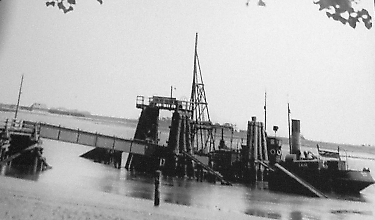 Eiderstedter Bahn